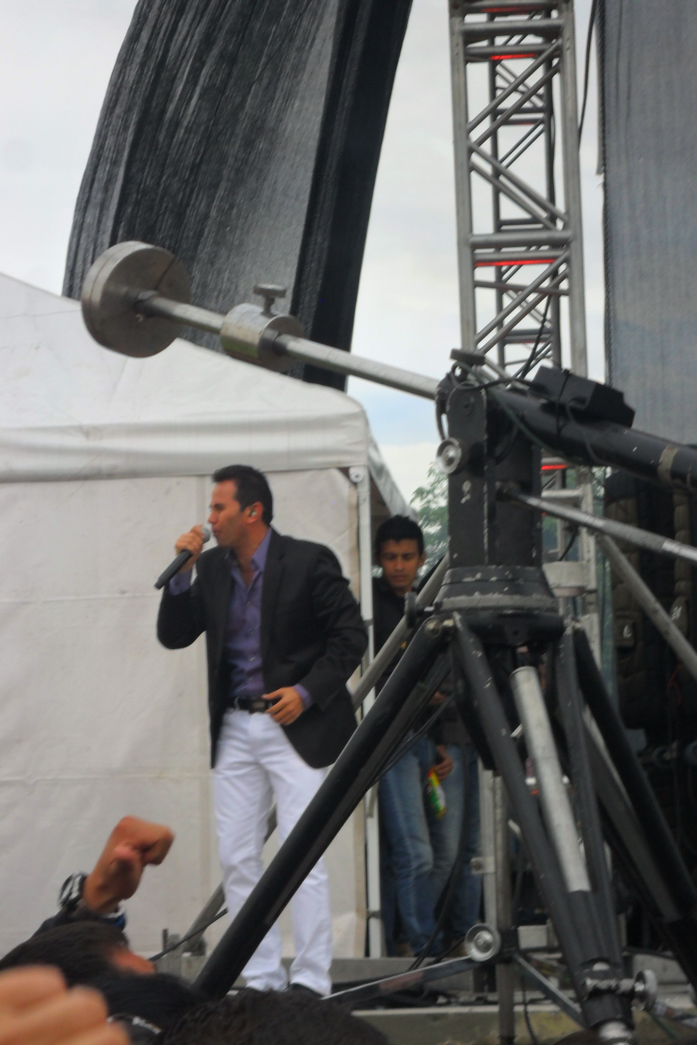 Jhonny Rivera